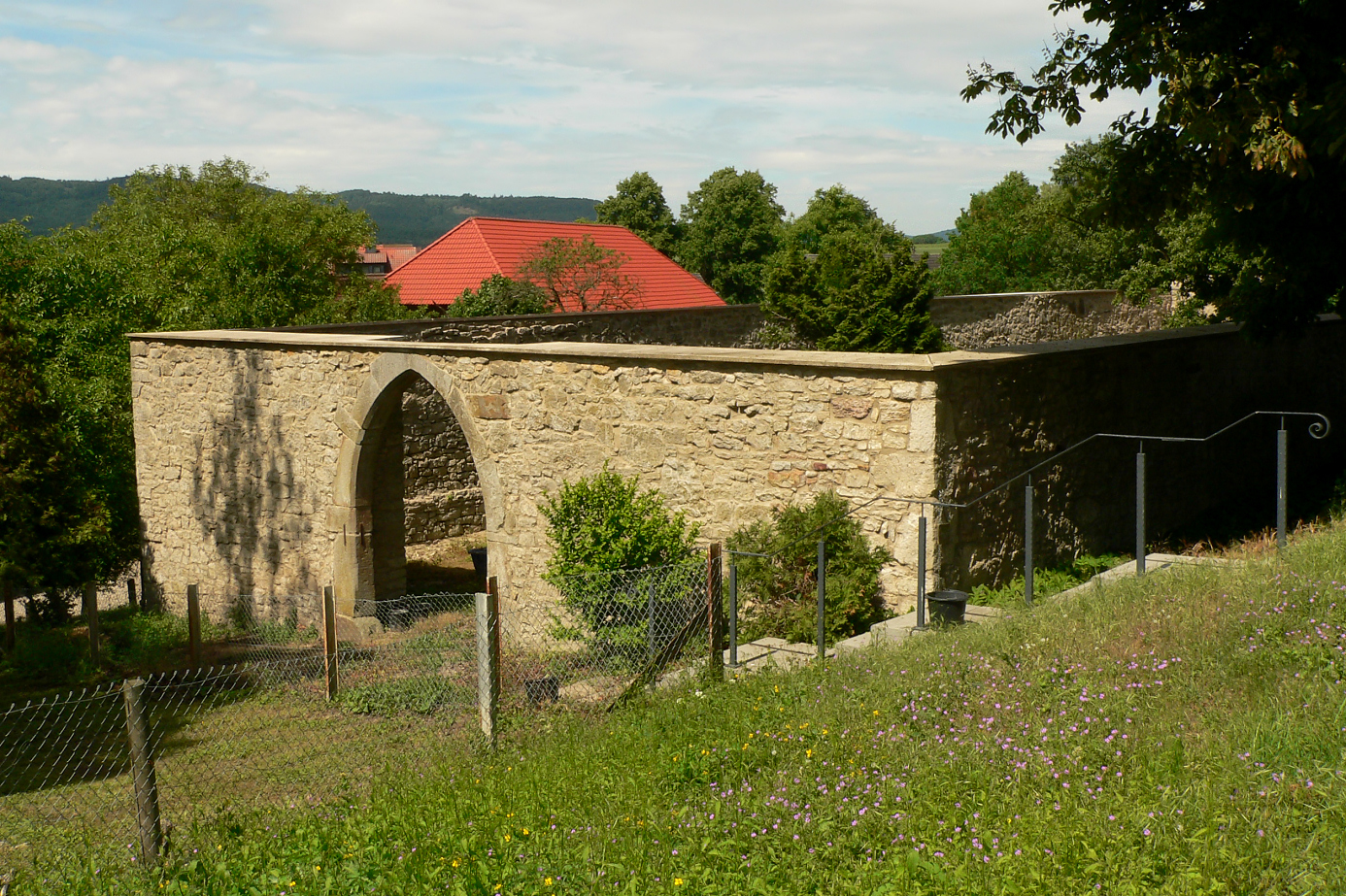 Früheres Wirtschaftsgebäude mit gotischem Tor des Kloster Wittenburg unterhalb der Anhöhe, kurz nach der Sanierung, ein Teil einer Seitenwand rechts ist noch nicht saniert und zusammengestürzt